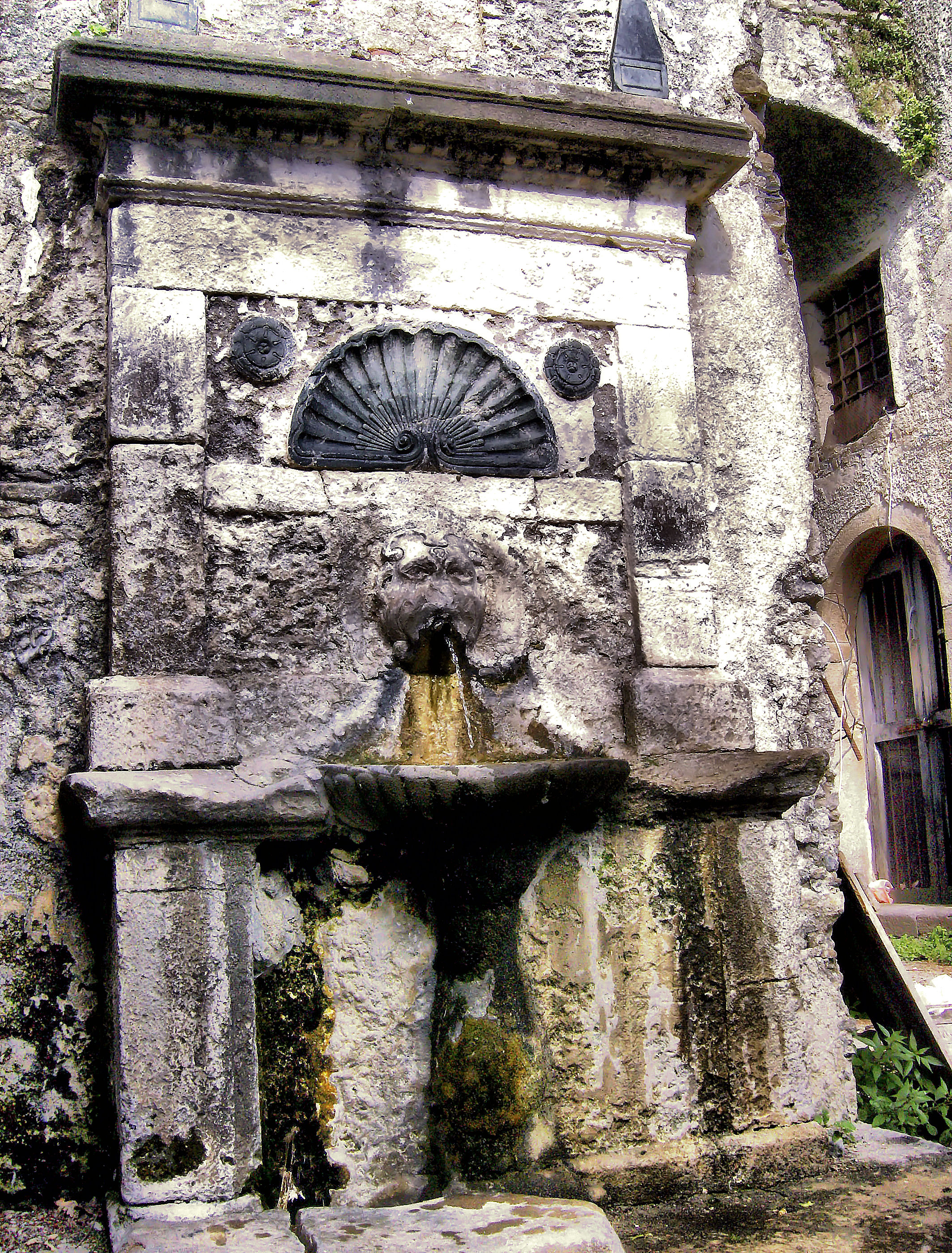 Scattata da me medesimo in Località Augurato di Campora San Giovanni, io sono l'autore della foto, io la carico e la cedo a Wikipedia, la cedo sotto licenza cc-by-sa. Distintissimi Saluti--23:44, 9 mag 2009 (CEST)